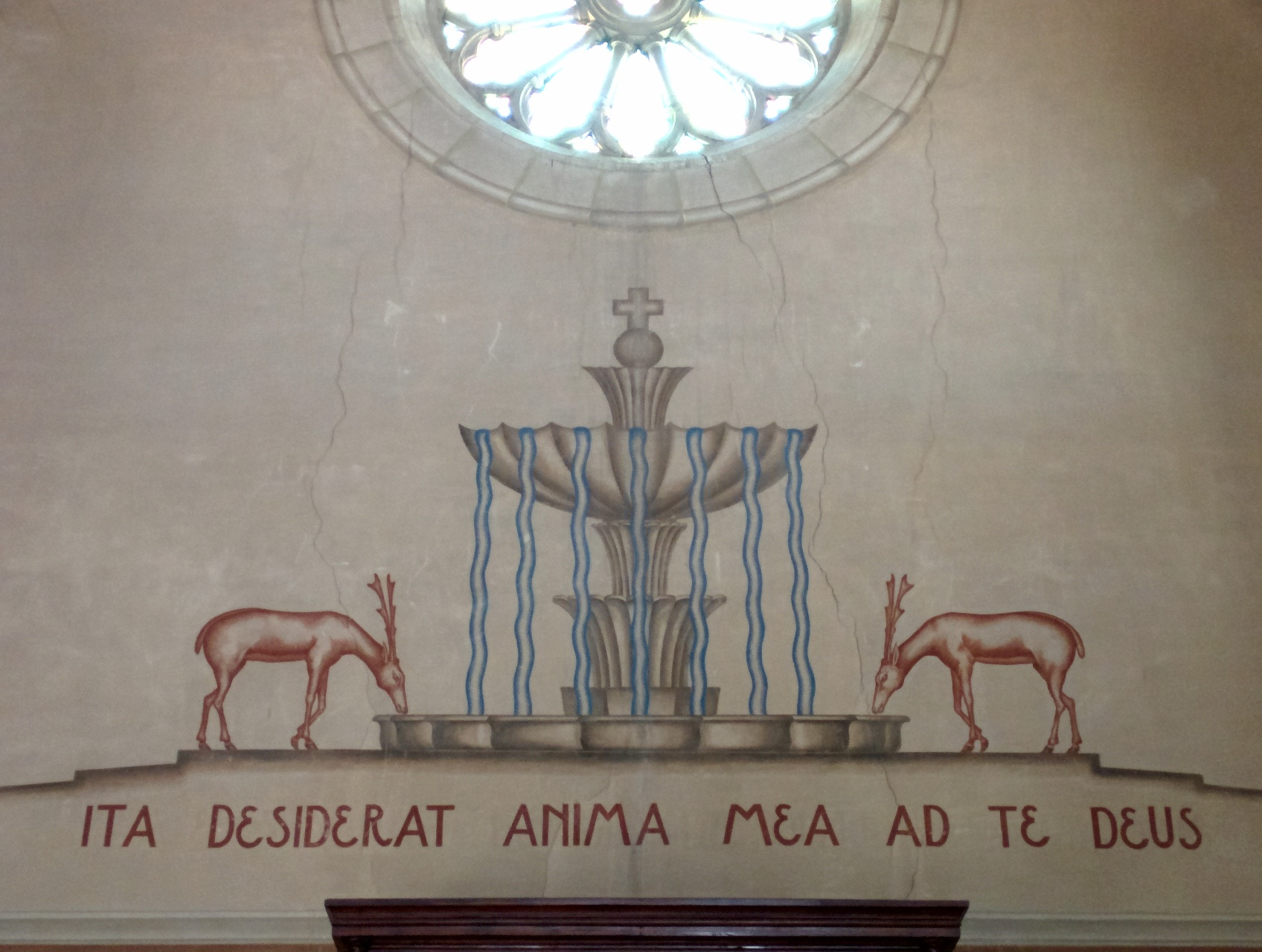 Due cervi bevono da una fontana a sette zampilli. Dettaglio delle decorazioni nella chiesa parrocchiale di San Vitale a Castelnovo di Isola Vicentina in provincia di Vicenza.